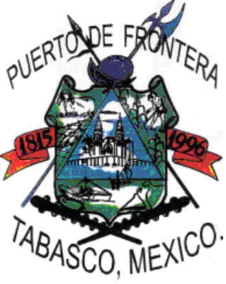 Escudo de la ciudad y puerto de Frontera, Tabasco